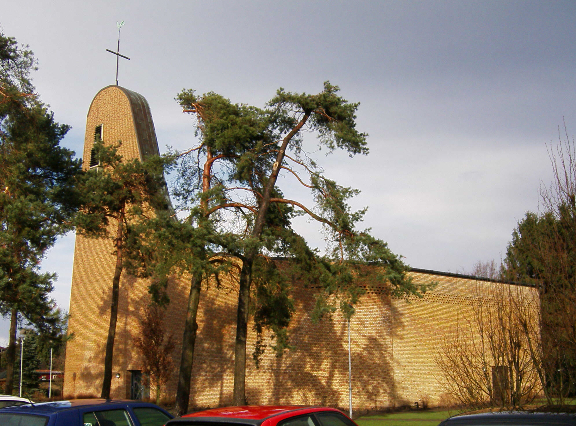 Kath. Kirche St. Josef in Neuenkirchen/St. Arnold, Kreis Steinfurt, Nordrhein-Westfalen, Deutschland